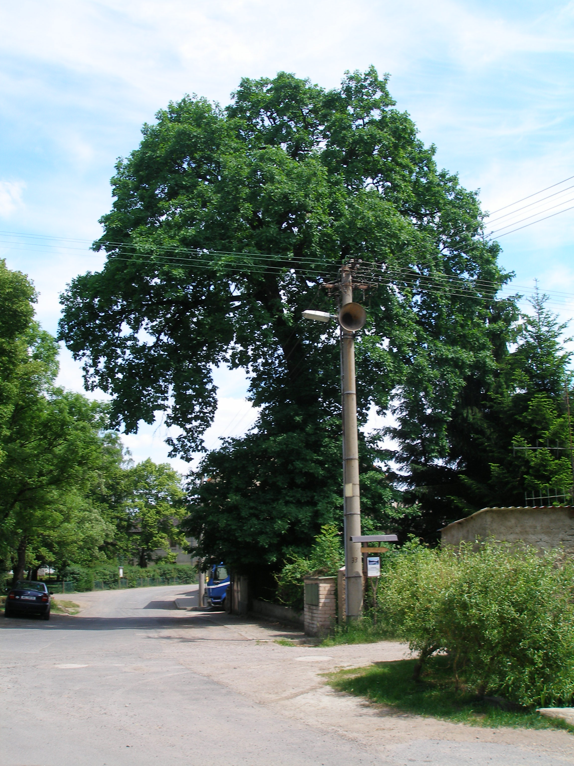 Památný dub u čp. 51 v Podlešíně.